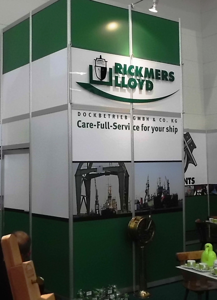 Messestand der Reparaturwerft Rickmers-Lloydauf der SMM